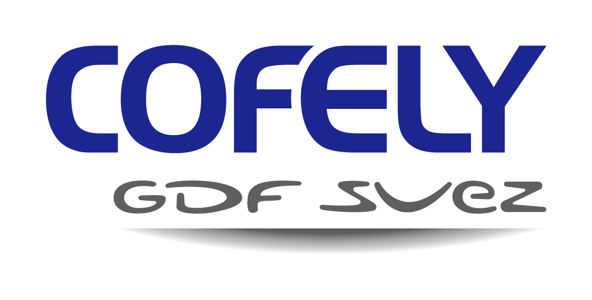 Dieses Bild zeigt das Firmenlogo der Cofely Refrigeration GmbH in Lindau (Bodensee), Teil der GDF Suez Gruppe.